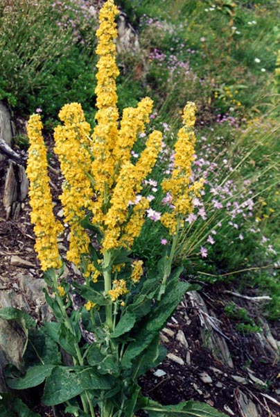 Verbascum chaixii